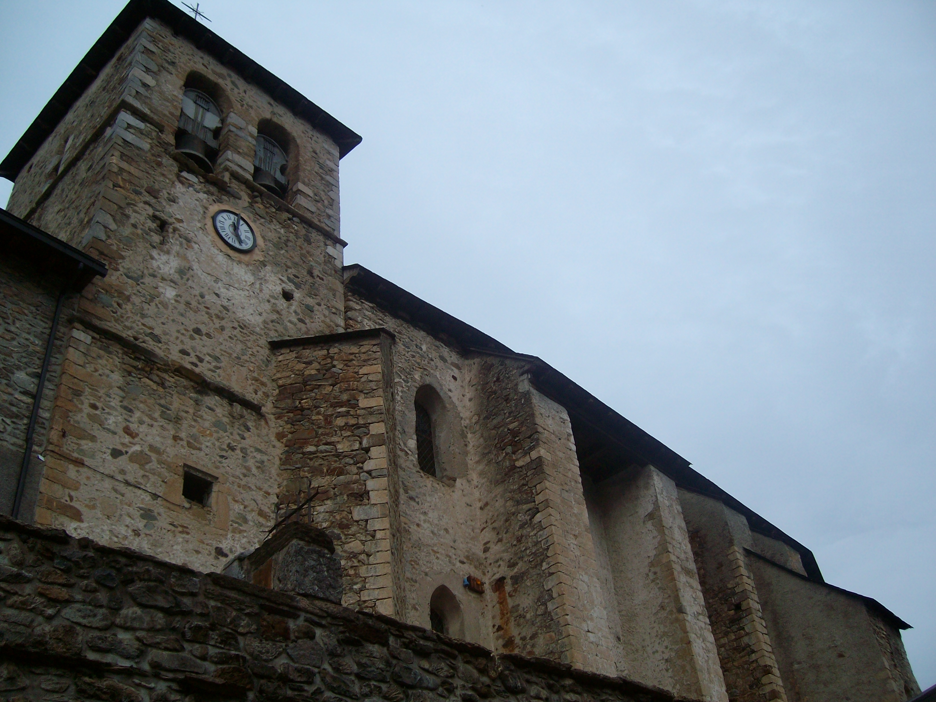 Iglesia Parroquial de Nuestra Señora de la Asunción, Sallent de Gállego (Huesca, España).